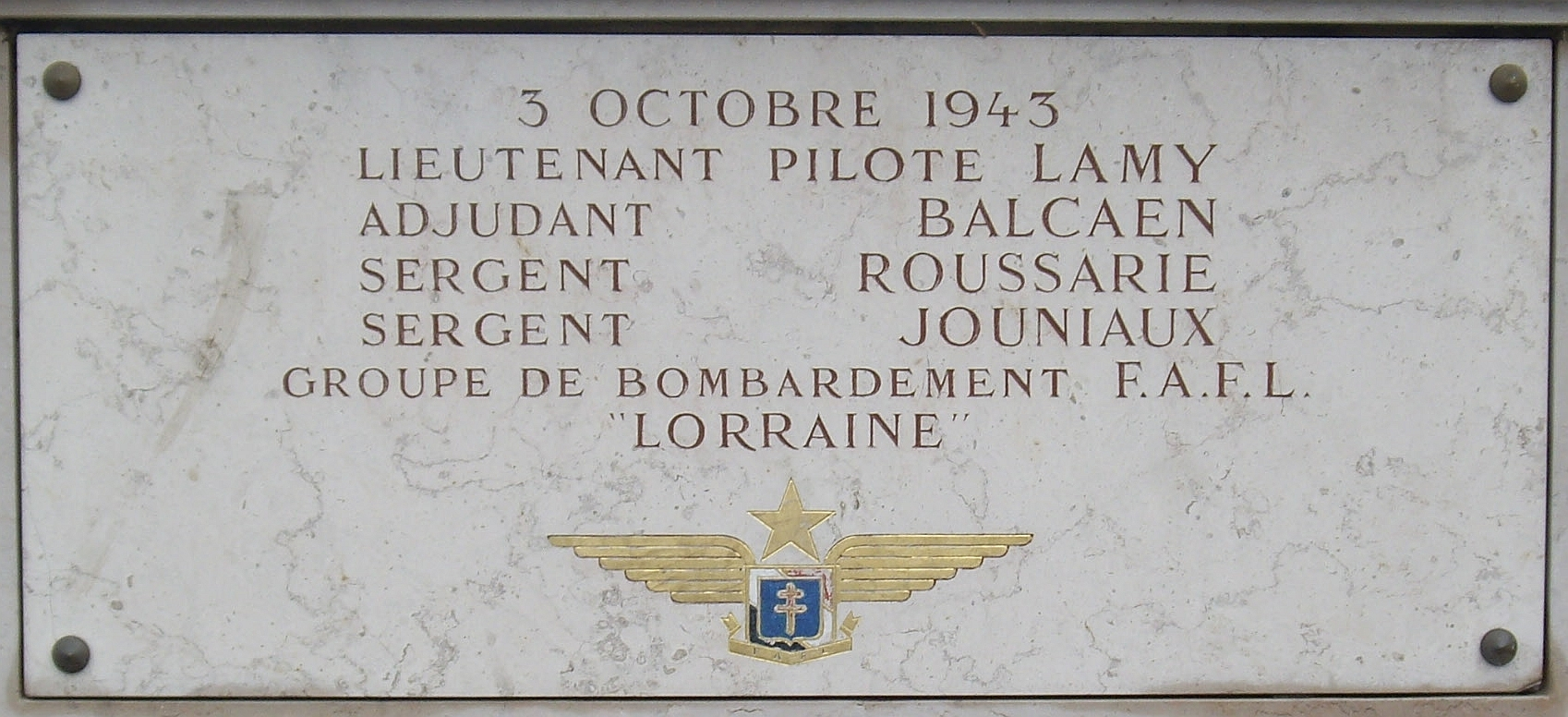 Plaque commémorative, Pont de Tolbiac, Paris 12e-13e.(2) « 3 octobre 1943. Lieutenant pilote Lamy, adjudant Balcean, sergent Roussaire, sergent Jouniaux. Groupe de bombardement FAFL "Lorraine". »